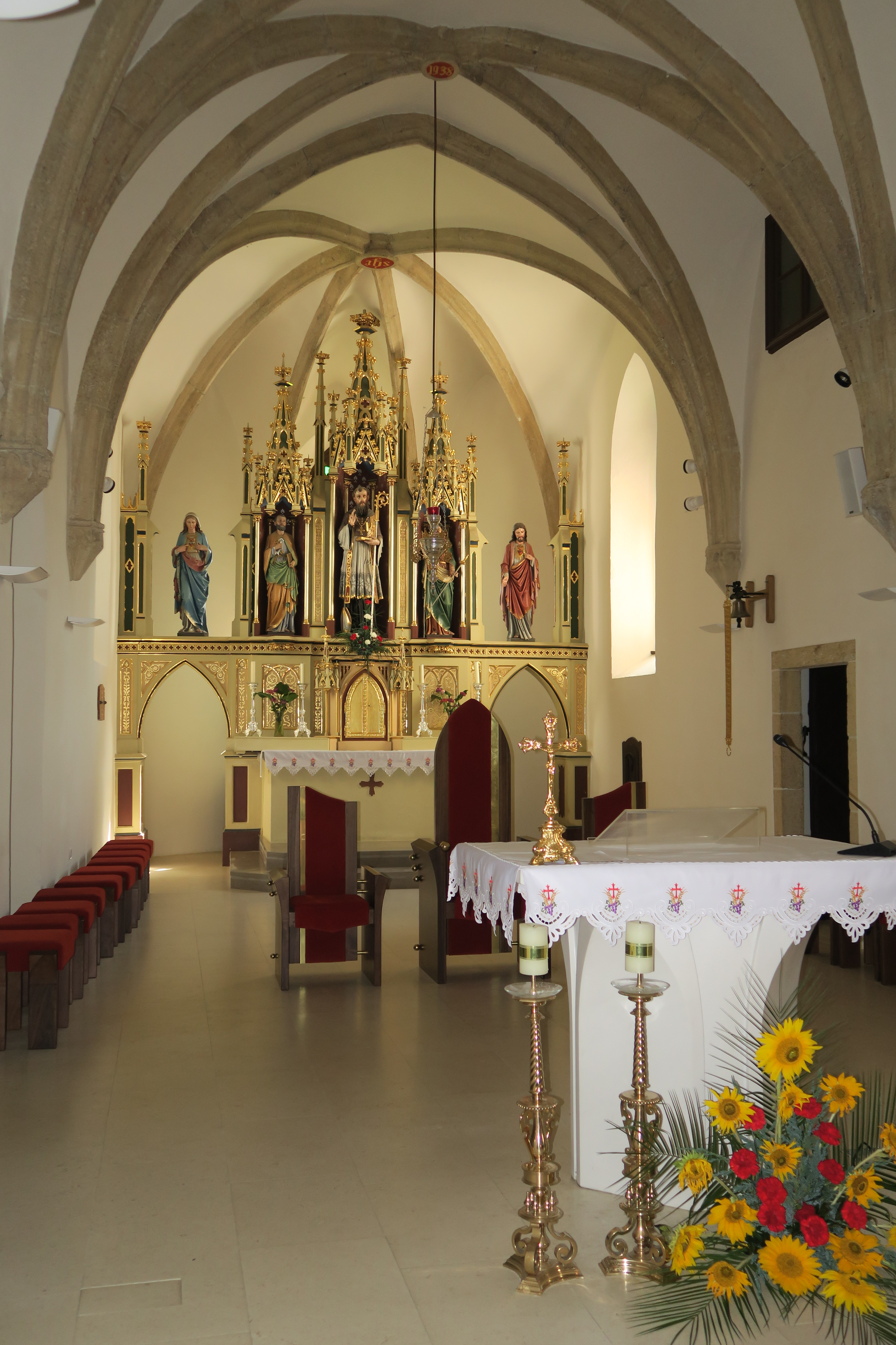 Kirche innen